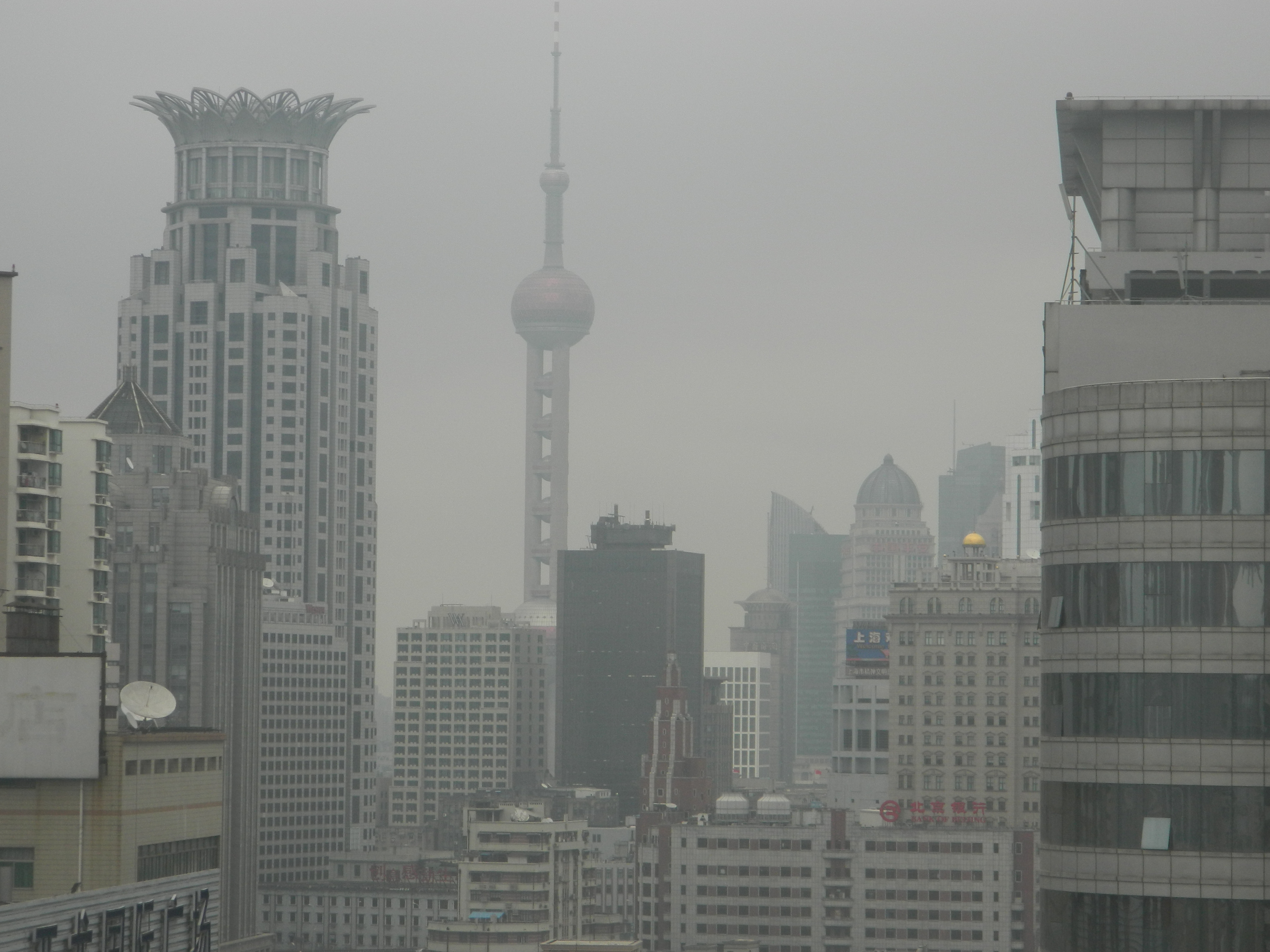 远眺陆家嘴-雾霾 Lujiazui in the haze